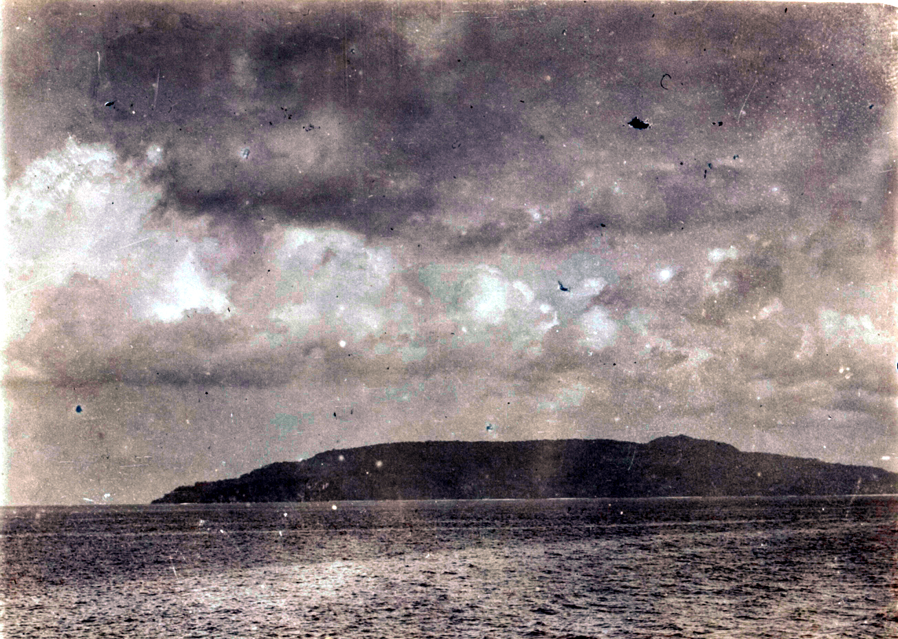 Academische Collecties: 1899-1900, Siboga-expeditie naar Nederlands Oost-Indië, onder leiding van Max Wilhelm Carl Weber Gezicht op het eiland.